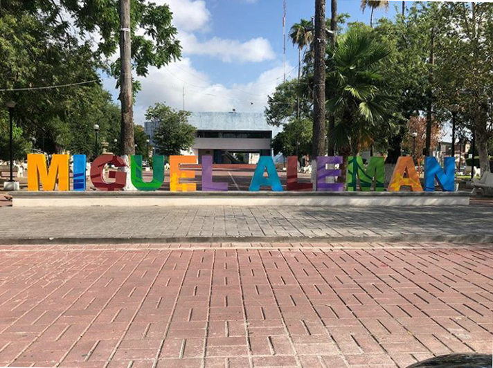 Miguel Alemán Centro